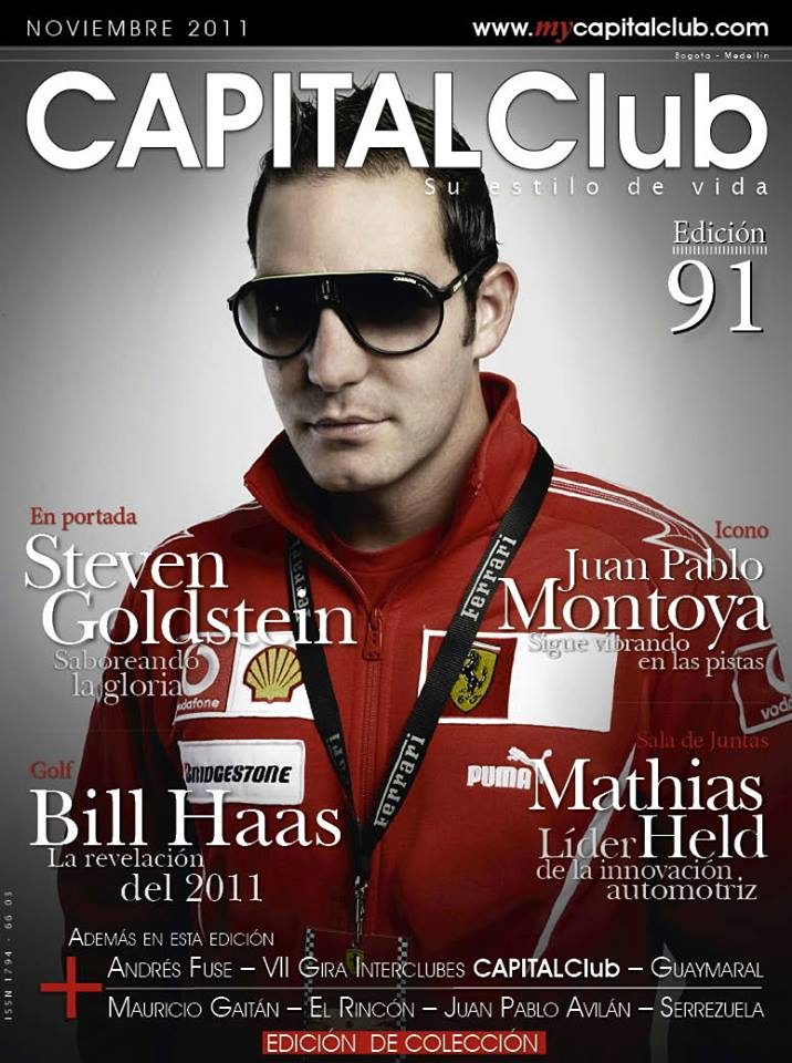 Scan of Capital Club Magazine with Steven Goldstein on the main page